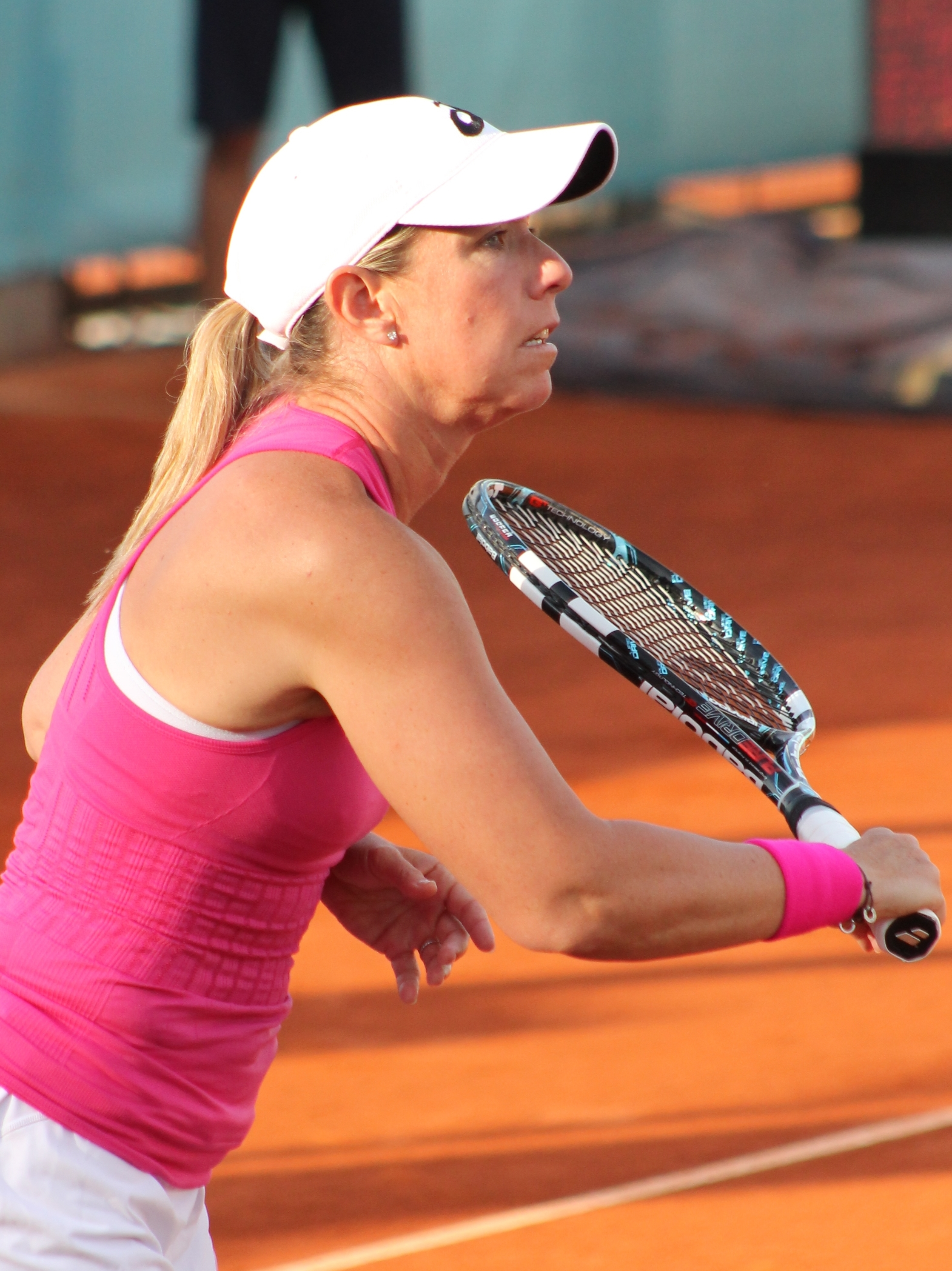 Lisa Raymond, Madrid 2014